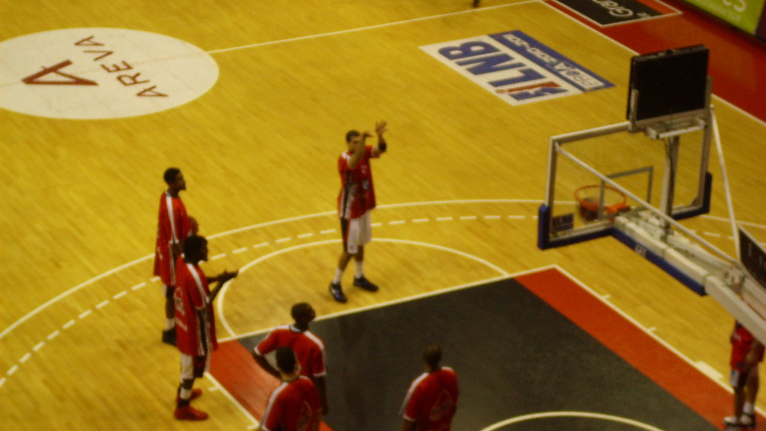 Blake Schilb au lancer-franc pendant l'échauffement de l'Elan Chalon avant son match contre Le Mans en 2011